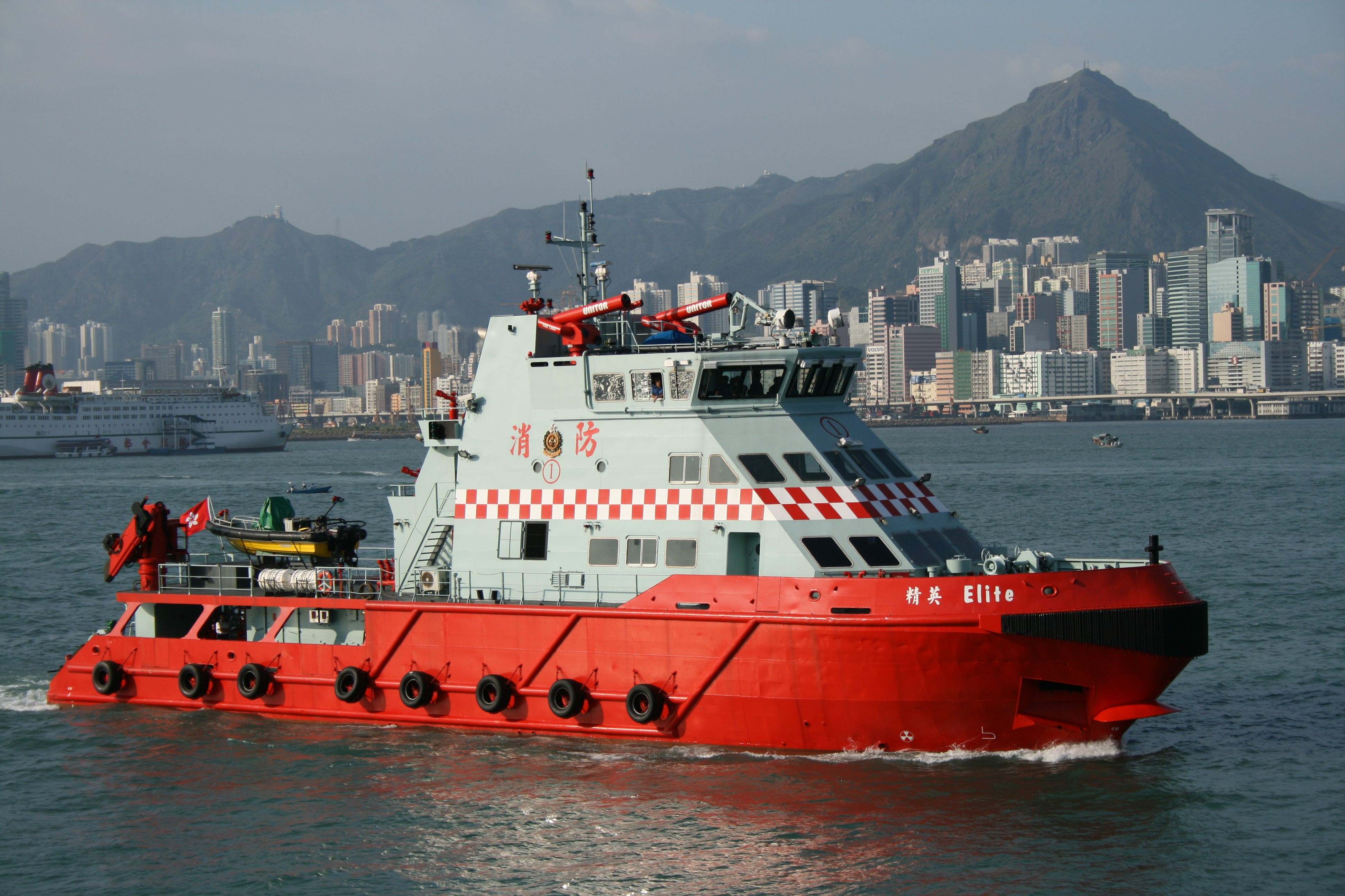 精英號消防船